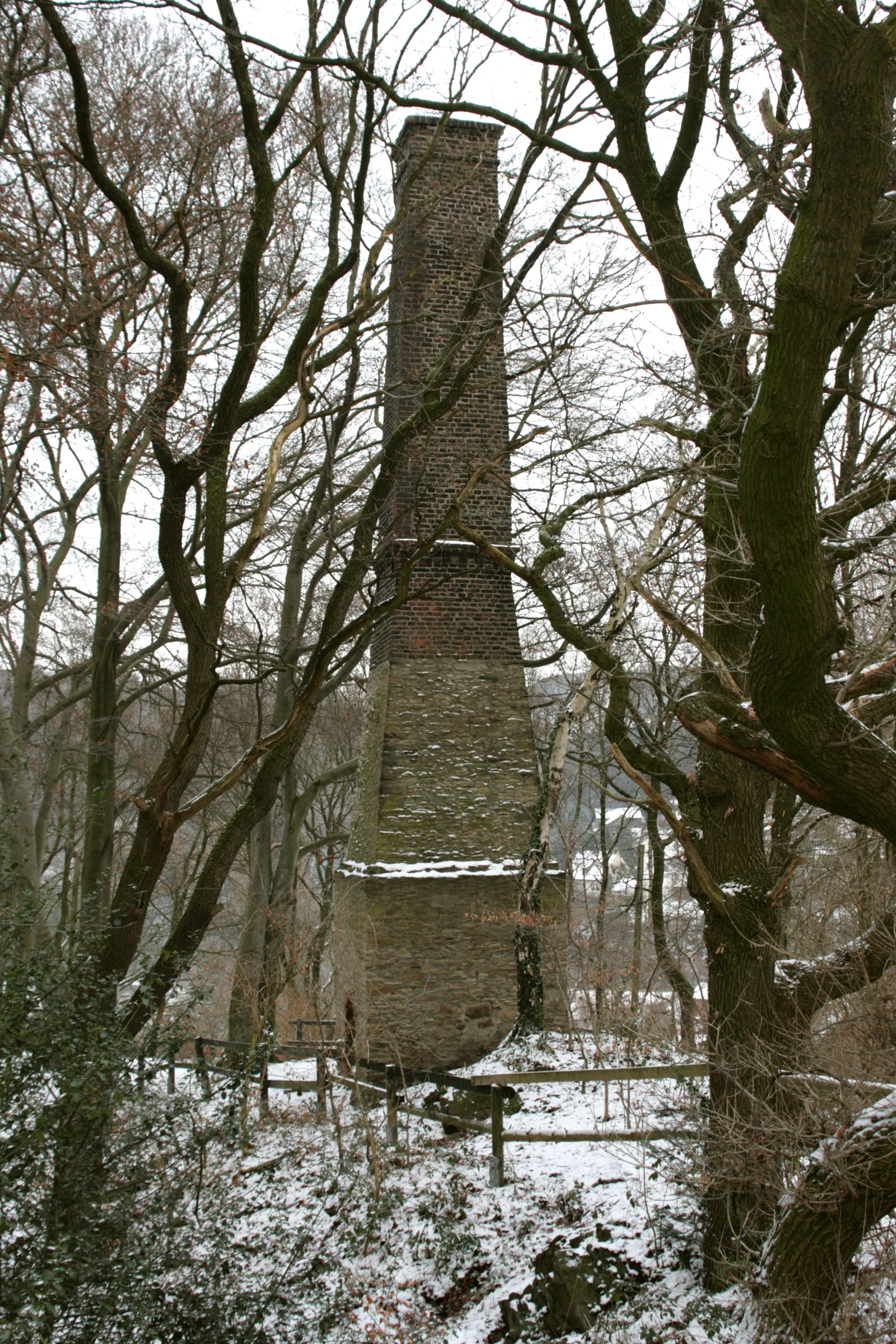 Wetterschornstein Buchholz in Witten